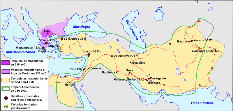 Formacion de l'Empèri d'Alexandre lo Grand.